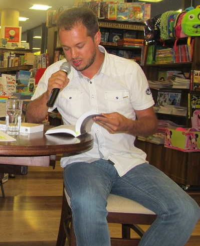 Николай Терзийски във Варна (2017)